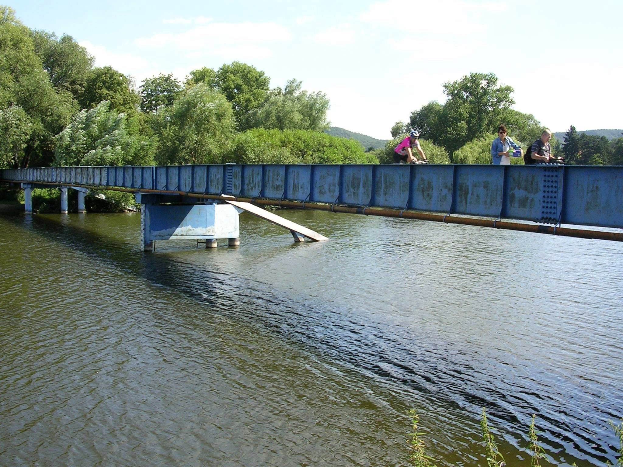 Lávka mezi městem Černošice a Dolními Černošicemi v městské části Praha-Lipence